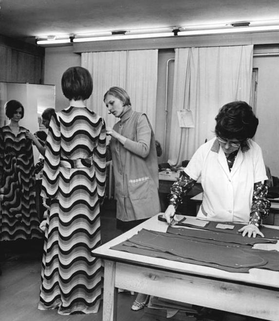 Zentralbild-Koch 8.5.1971 Leipzig: 25 Jahre Verlag für die Frau-In der Modellanfertigung des Verlages entstehen jährlich ca. 800 Modelle. Die Schneiderinnen Renate Bletry und Meisterin Karin Wiedemann (v.l.n.r.) sind wesentlich am Entstehen der Kollektion beteiligt. Internationale Anerkennung finden auch die Zeitschriften, Bücher und Schnittmuster des Verlages, der 1971 auf ein 25-jähriges Bestehen zurückblicken kann. Seine Erzeugnisse werden in 40 Länder exportiert. Bitte beachten Sie auch das Motiv K0508-03-1N